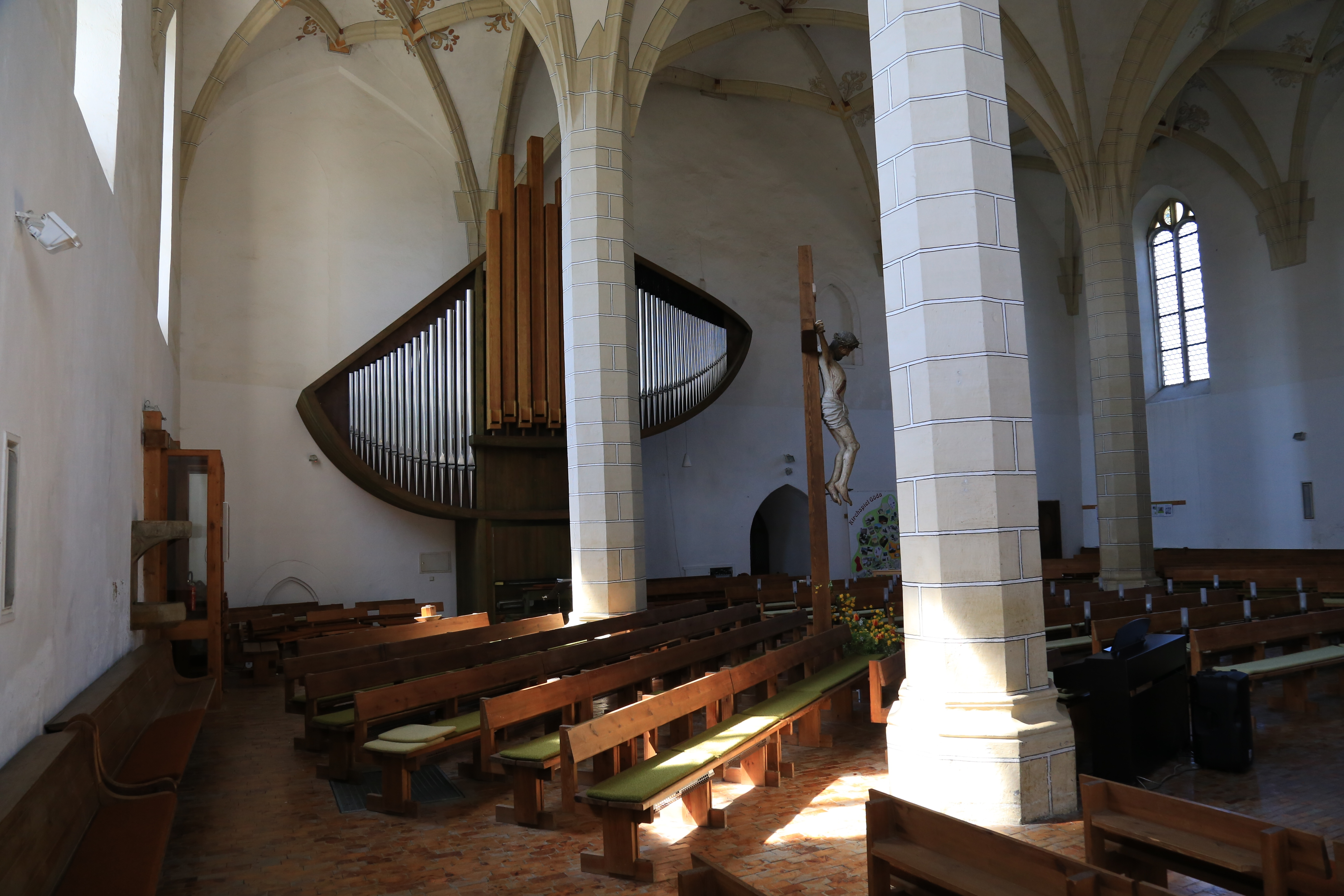 Göda Kirche April 2017 (10) Hornjoserbsce: Ewangelska cyrkej swjateju Pětra a Pawoła w Hodźiju